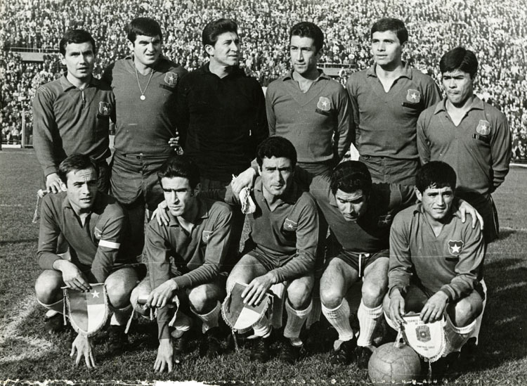 Selección Chilena de Fútbol (1966). De pie: Valentini, Aldo / Marcos, Rubén / Godoy, Adán/ Villanueva, Hugo / Figueroa, Elías / Cruz, Humberto / Agachados: Fouilloux, Alberto / Prieto, Ignacio / Tobar, Armando / Ramírez, Jaime / Araya, Pedro.